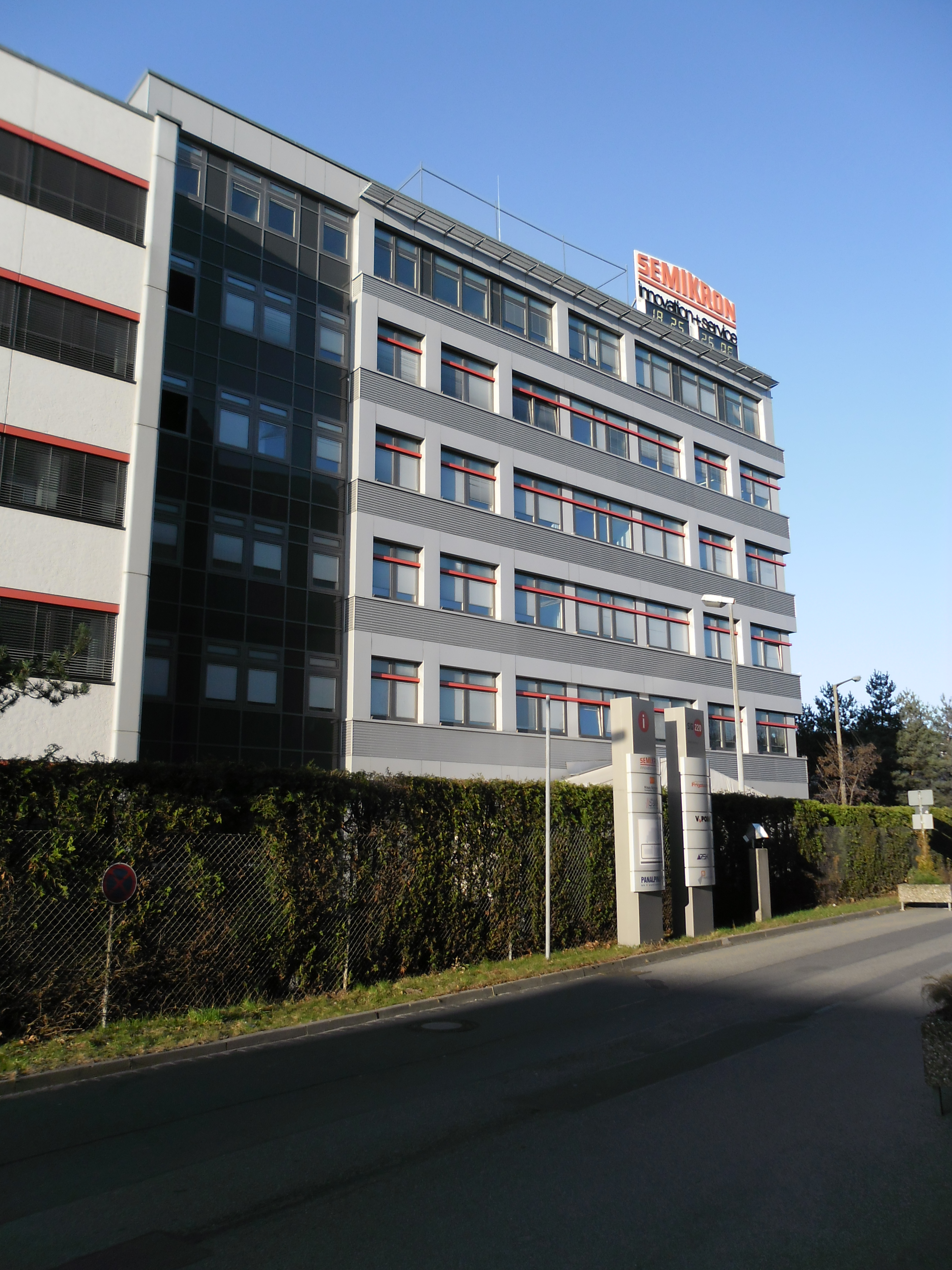 SEMIKRON Elektronik GmbH Sigmundstraße 200 Nürnberg 04